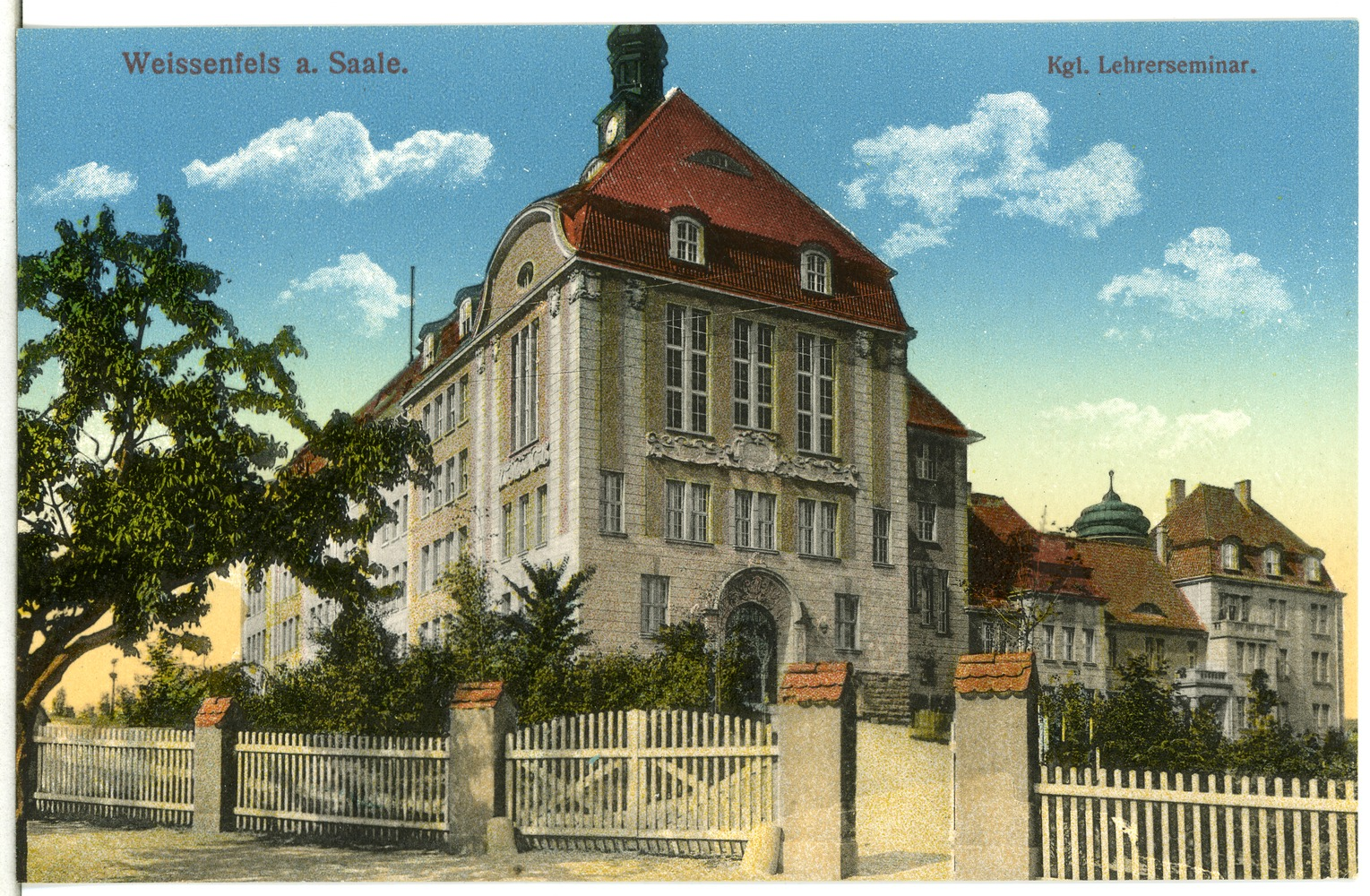 Weißenfels; Königliches Lehrerseminar This postcard is from publisher Brück & Sohn in Meißen ( This postcard has a unique number 14690 and is available in a higher resolution at the publisher. This images was uploaded in a cooperation project between Wikipedians and the publisher.